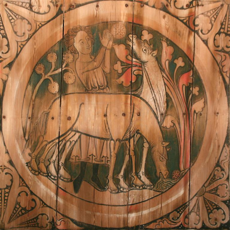 Foto: Tor Svensson